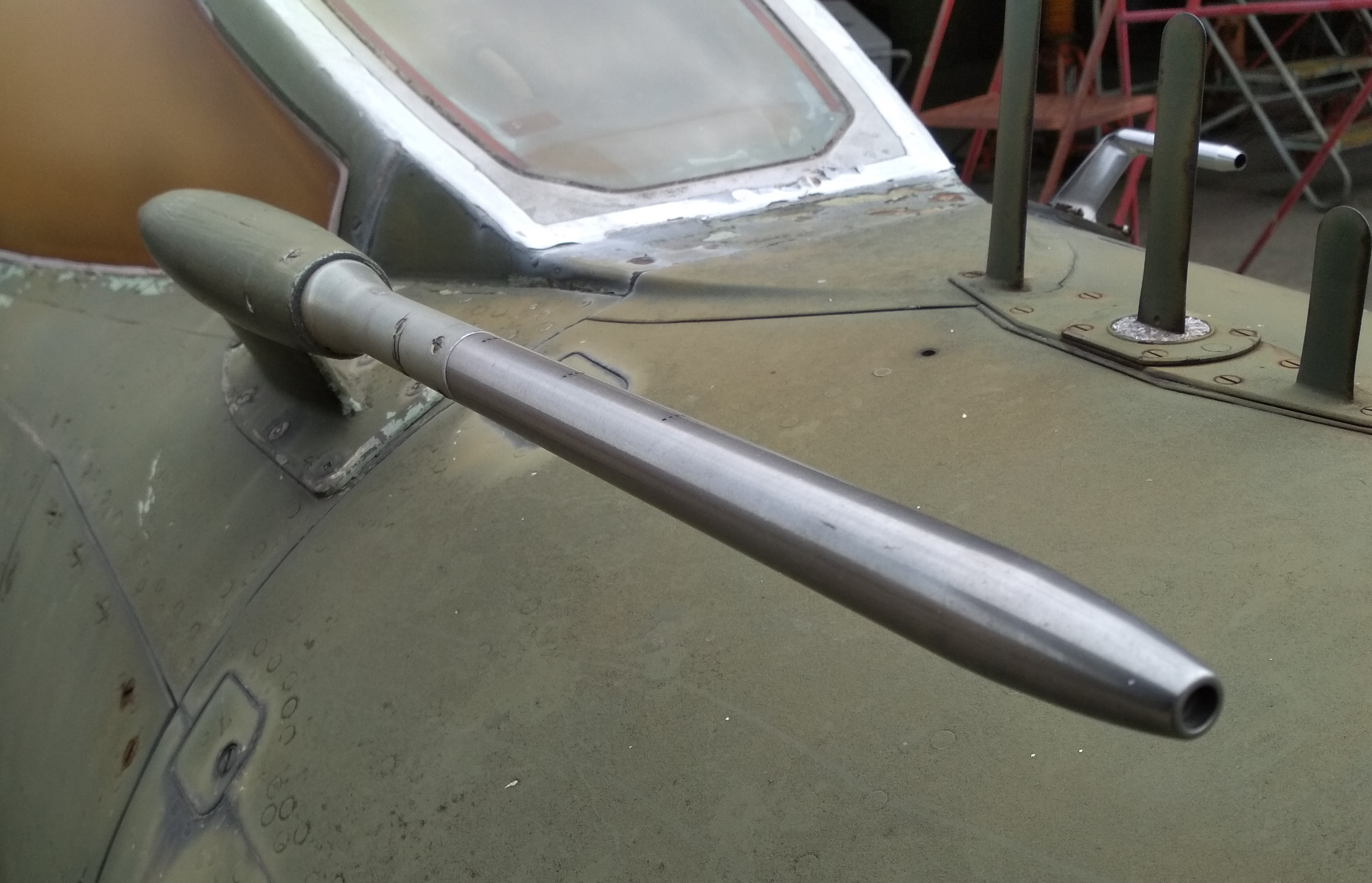 Rurka Prandtla samolotu Mig-23. Widoczne serie otworów ciśnienia statycznego i otwór wlotowy